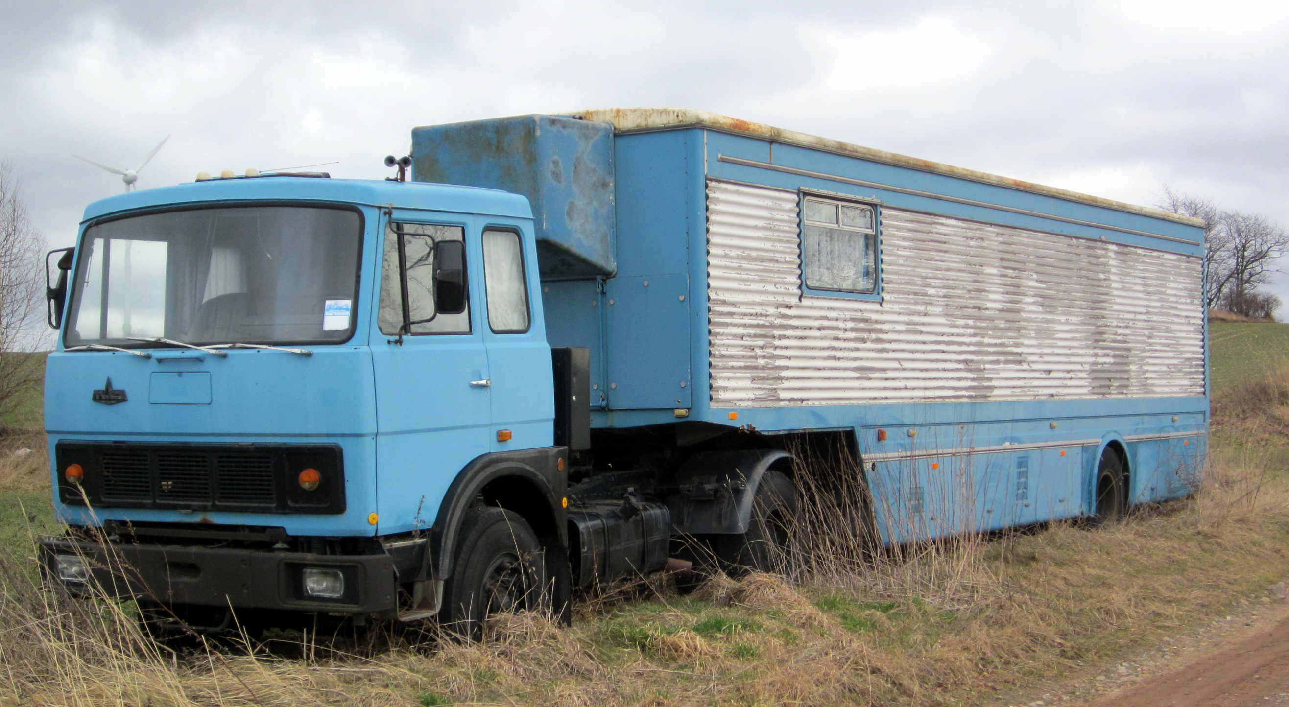 Fahrbibliothek Dresden Auflieger 1980er Jahre 2014 abgestellt bei Maxen ca. 50° 55′ 10″ N, 13° 47′ 50″ O